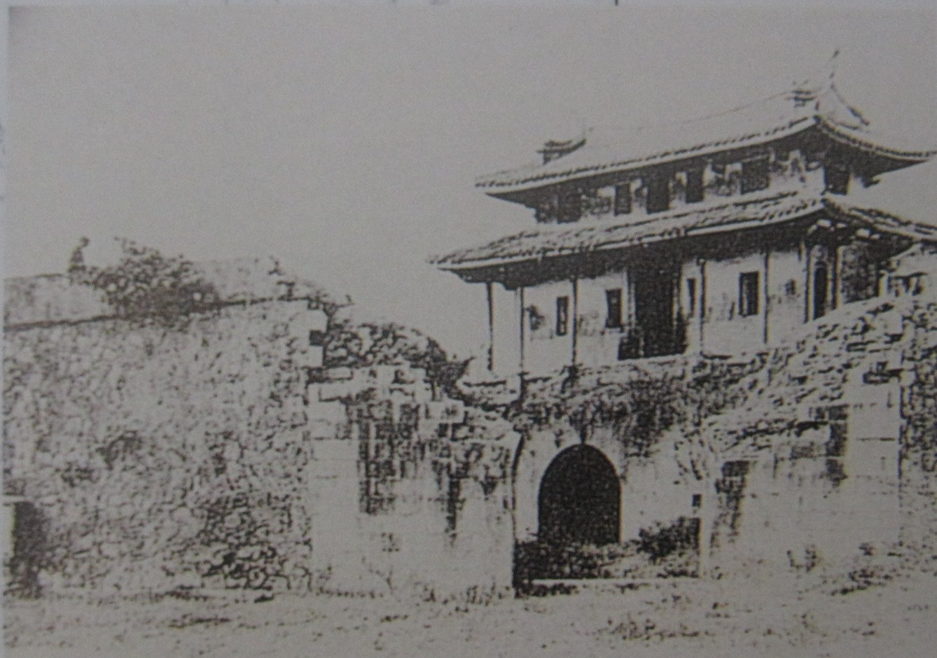 1905年的臺灣府城大南門